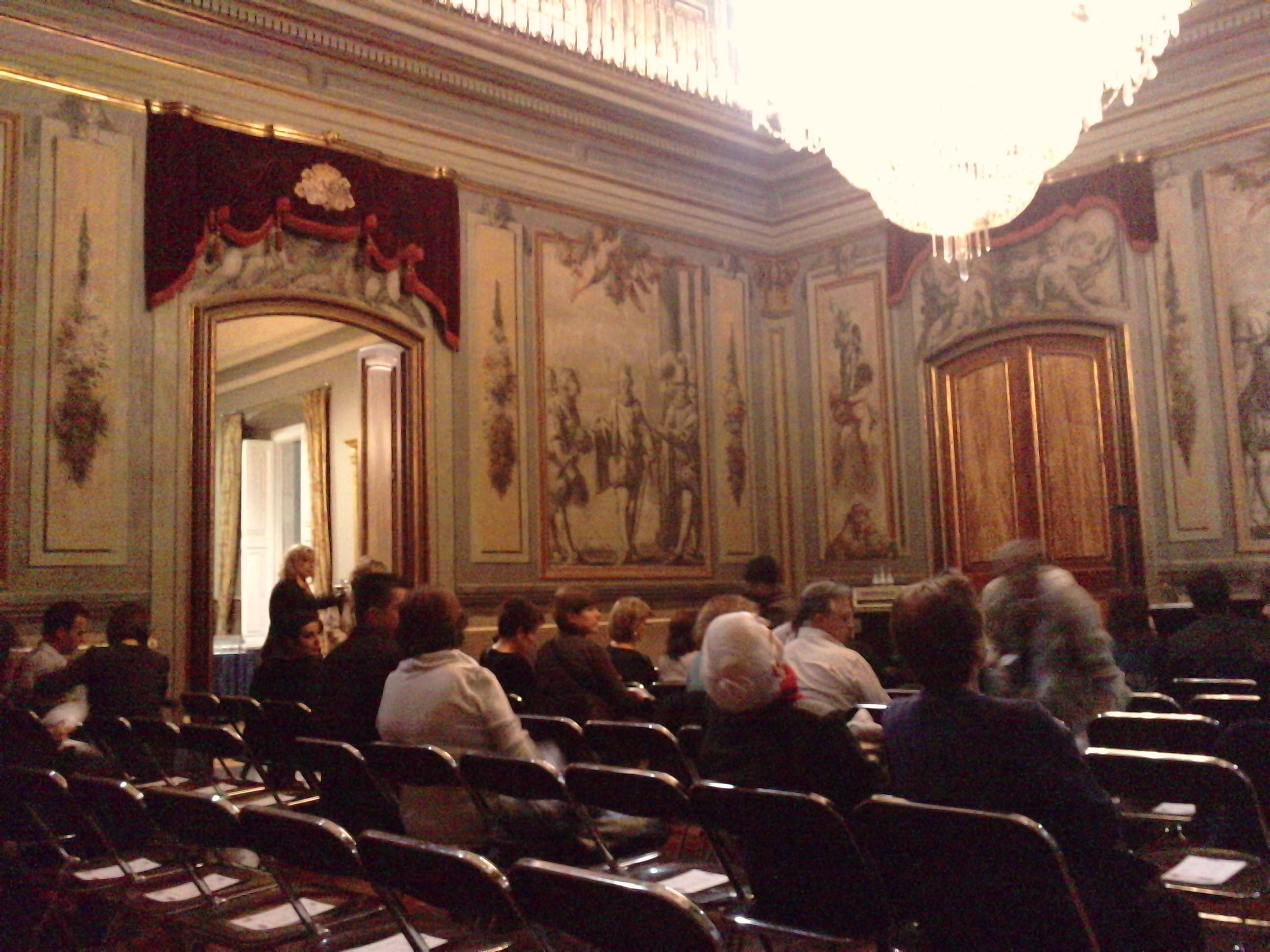 Sala d'Actes del Palau Moja